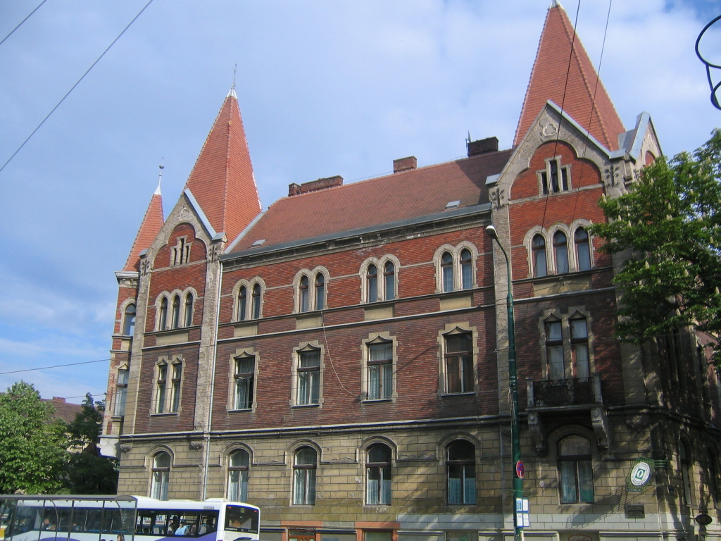 Parohia Reformata Timisoara.